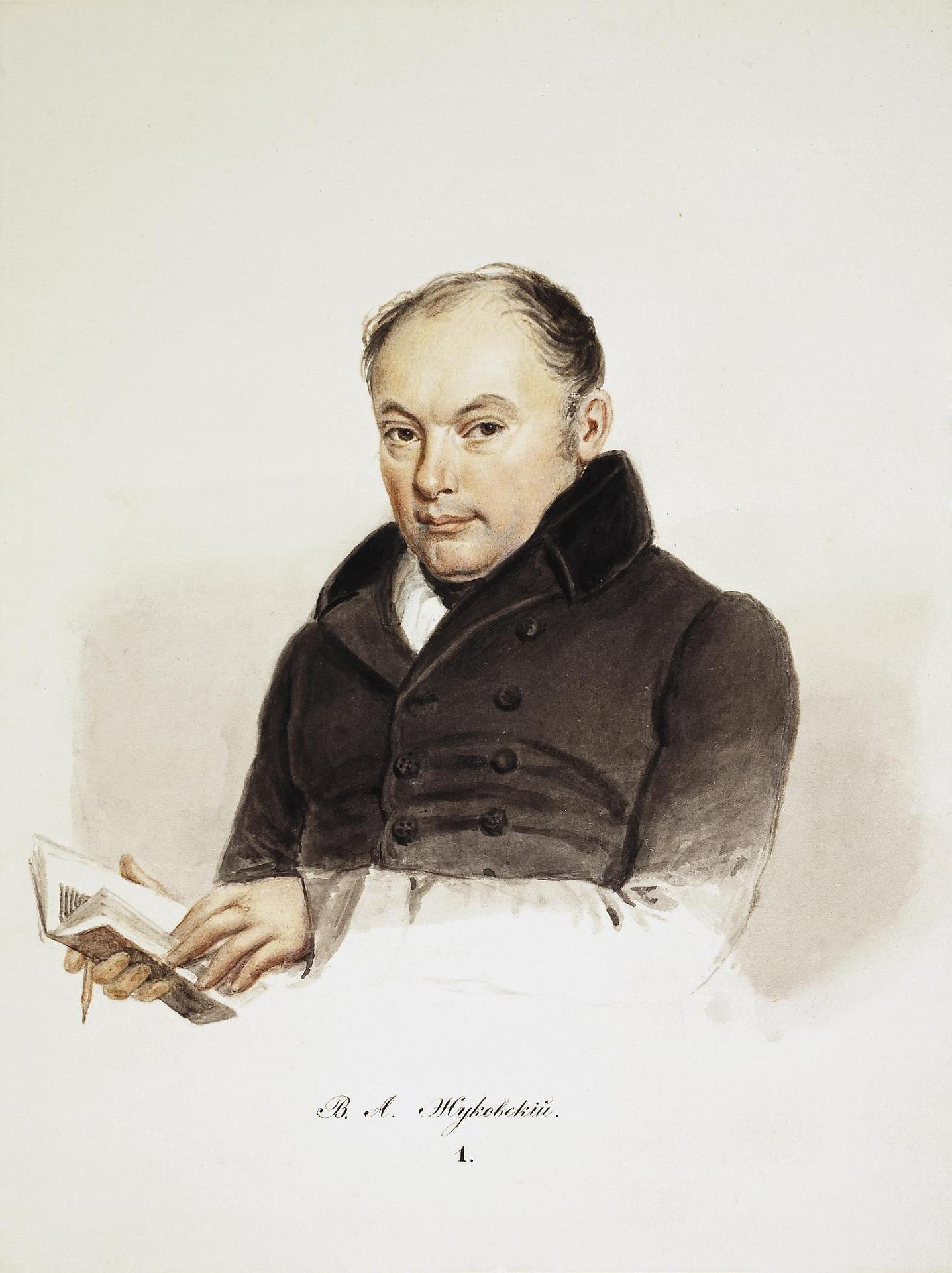 Серия "Портреты воспитателей будущего императора Александра II"